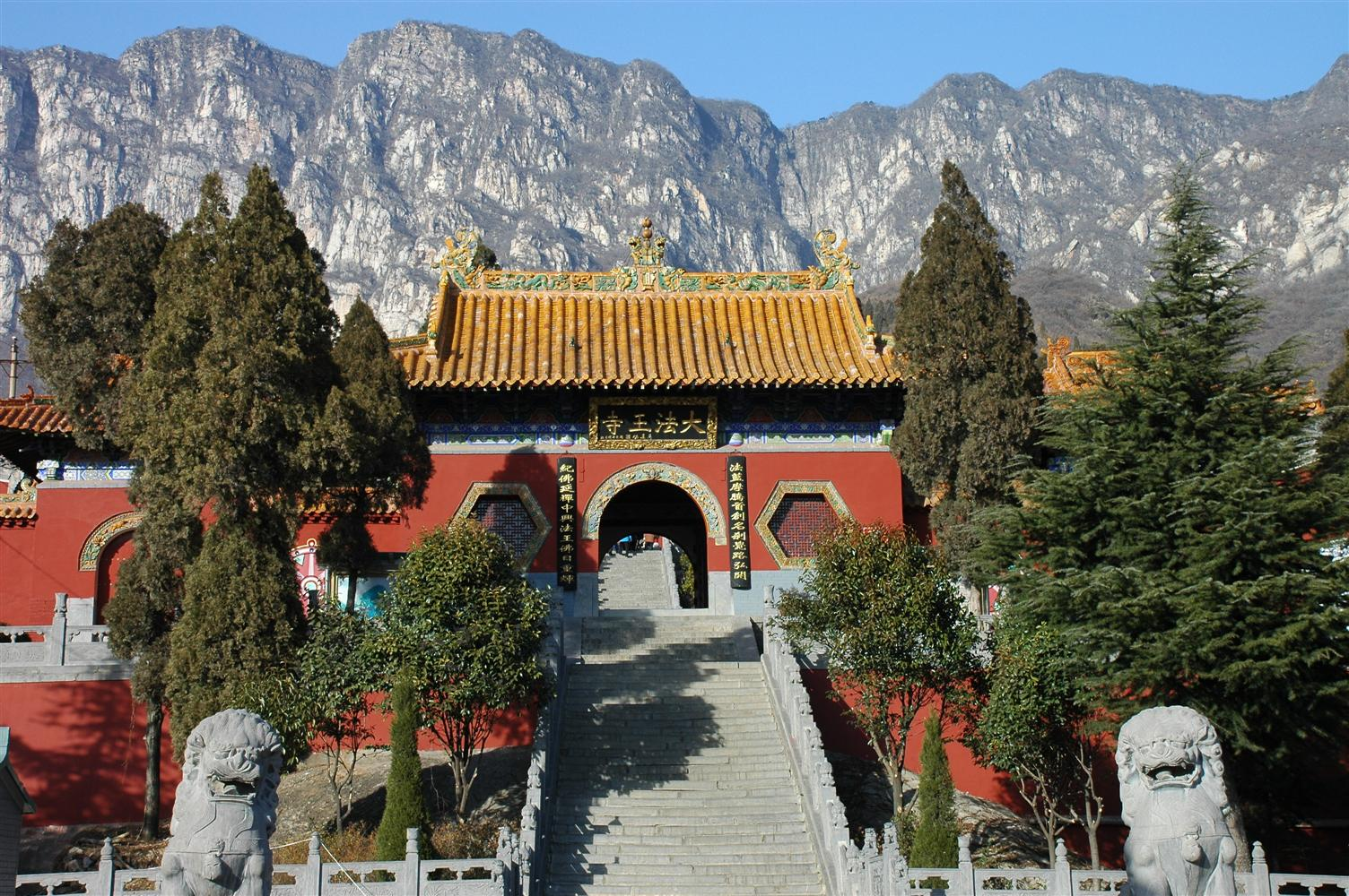 河南登封嵩山法王寺